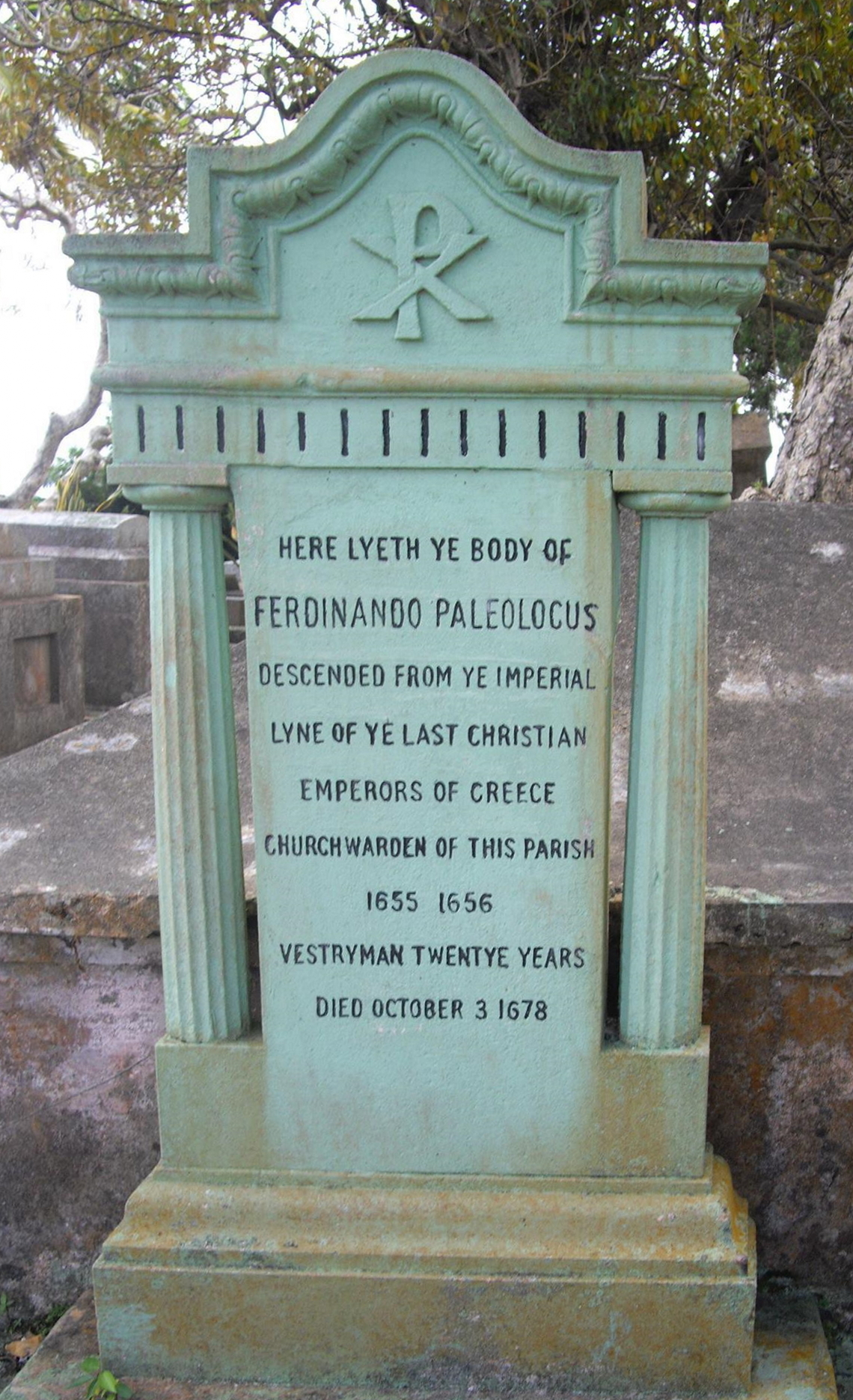 La sua lapide tombale si trova nel cimitero di Saint John nelle Barabdos e recita così: Here Lyeth ye body of Ferdinando Paleolocus descenden from ye imperial line of ye last christian emporers of Greece, churchwarden of this parish 1655 – 1656 vestryman twentye years died October 3, 1678. (Qui giace il corpo di Ferdinando Paleolocus, discendente della linea imperiale degli ultimi imperatori cristiani della Grecia, amministratore laico di questa parrocchia. 1655 – 1656 membro dell'assemblea parrocchiale per 20 anni, morto il 3 ottobre 1678)